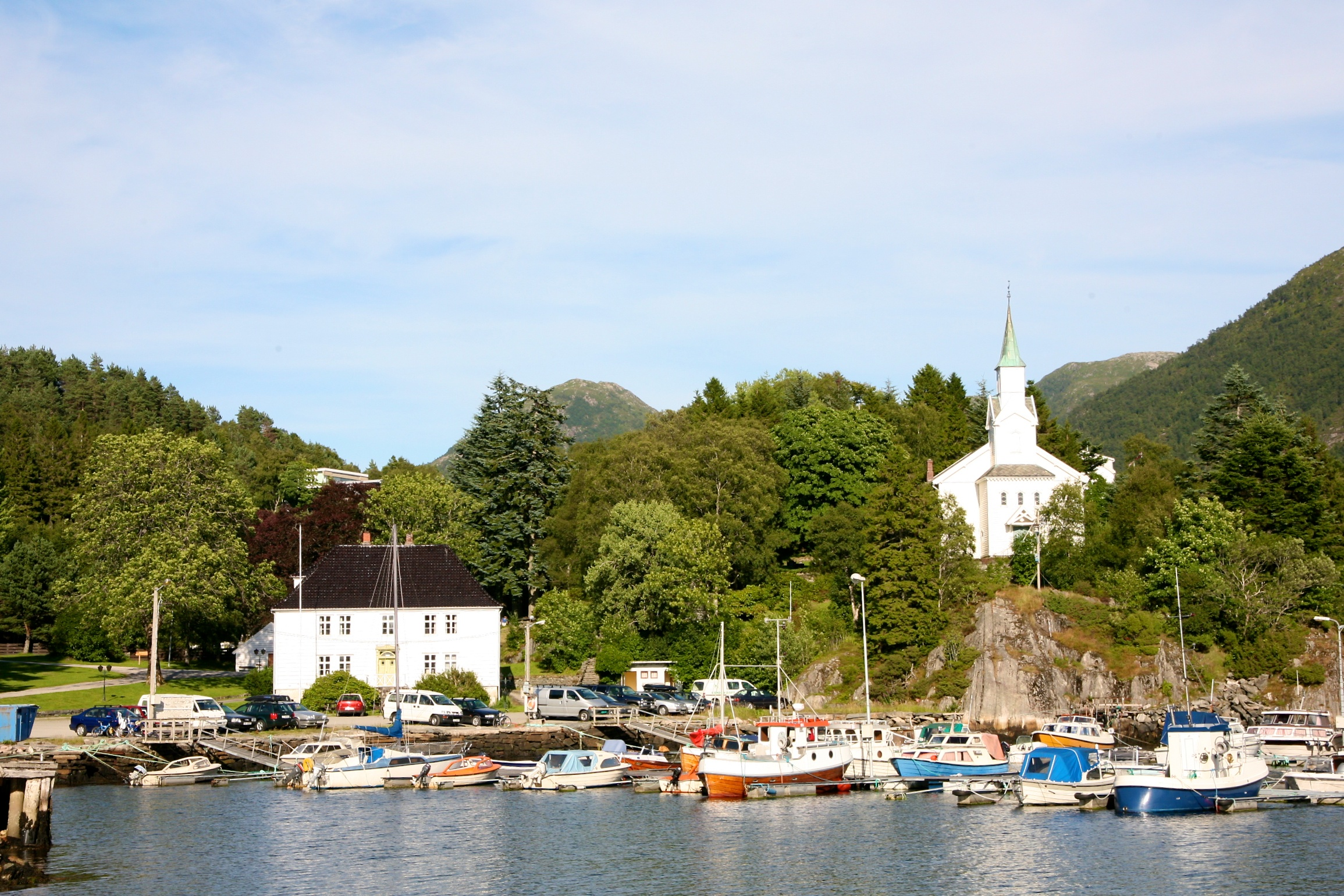 Gulen